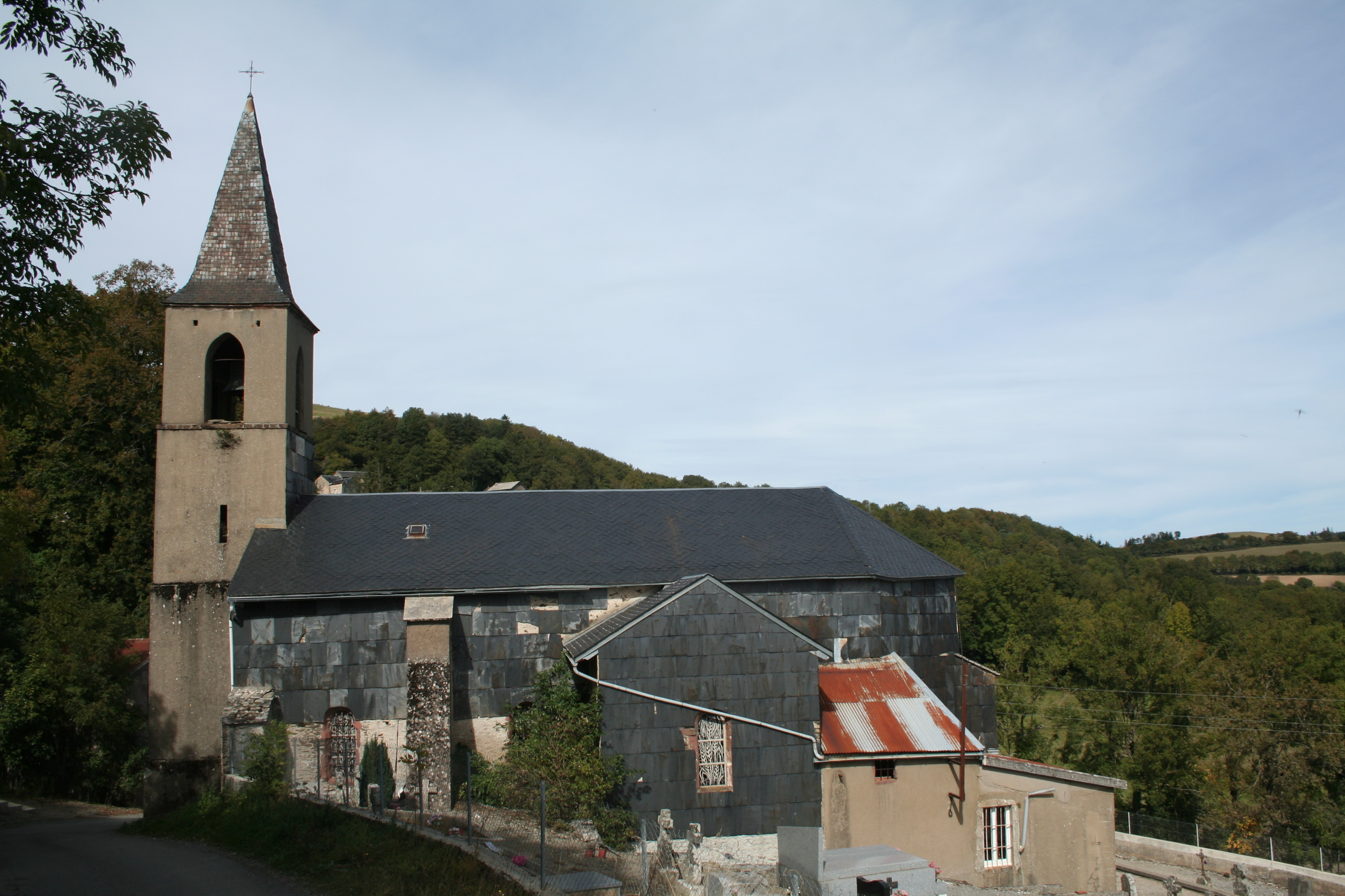 Moulin-Mage (Tarn) - église Saint-Hilaire de Cabannes. Église reconstruite en 1837 - longueur 18,5 m, largeur 8,10 m, deux chapelles, clocher de 25 m de haut.